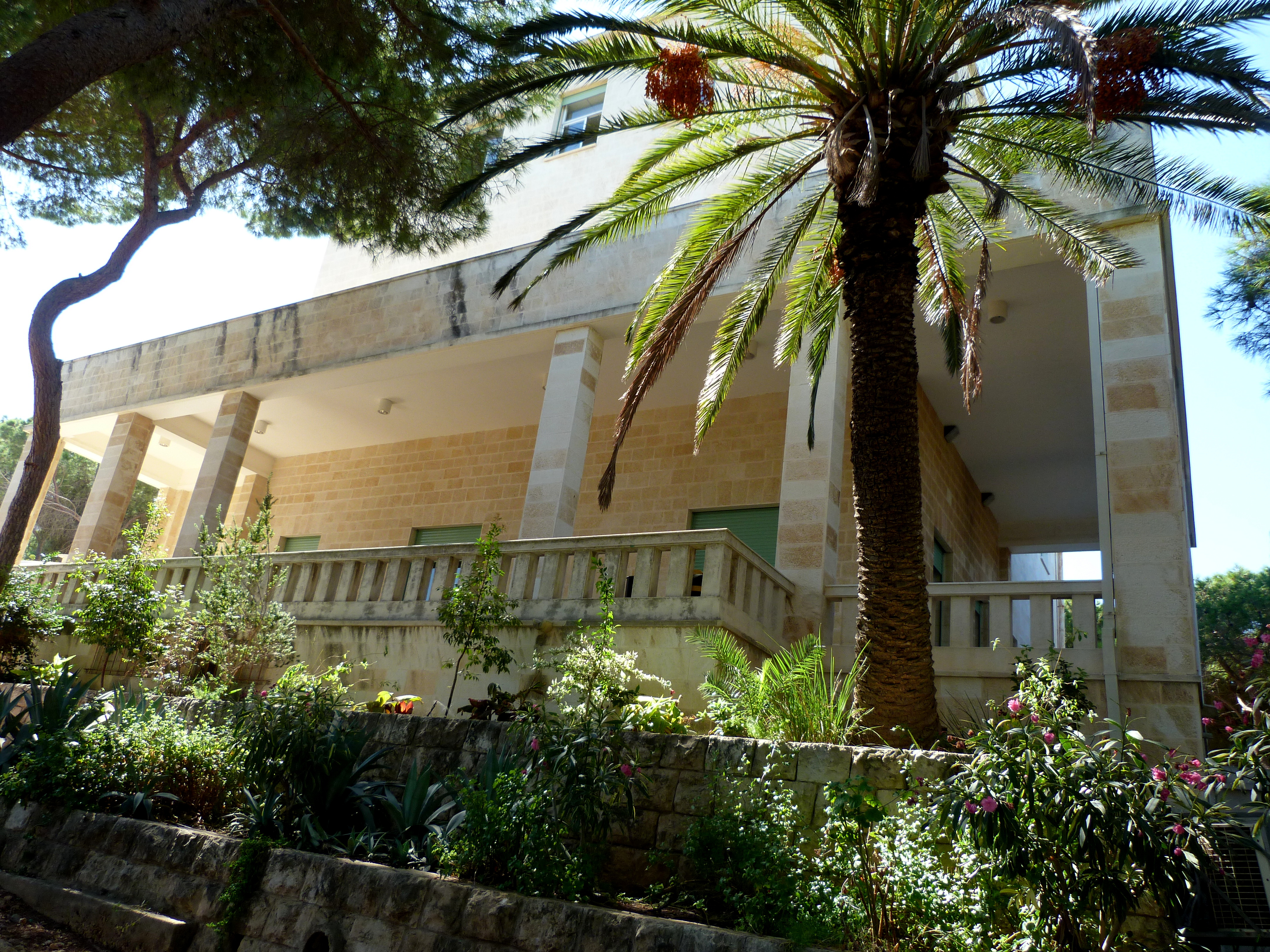 בית רוטנברג במרכז הכרמל בחיפה